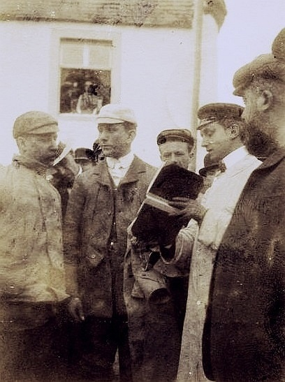 Arthur John McCormack (à gauche) parle avec Charles Jarrott, vainqueur du Circuit des Ardennes 1902